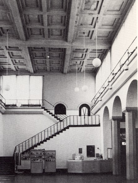 Liljevalchs konstahall i Stockholm, interiör